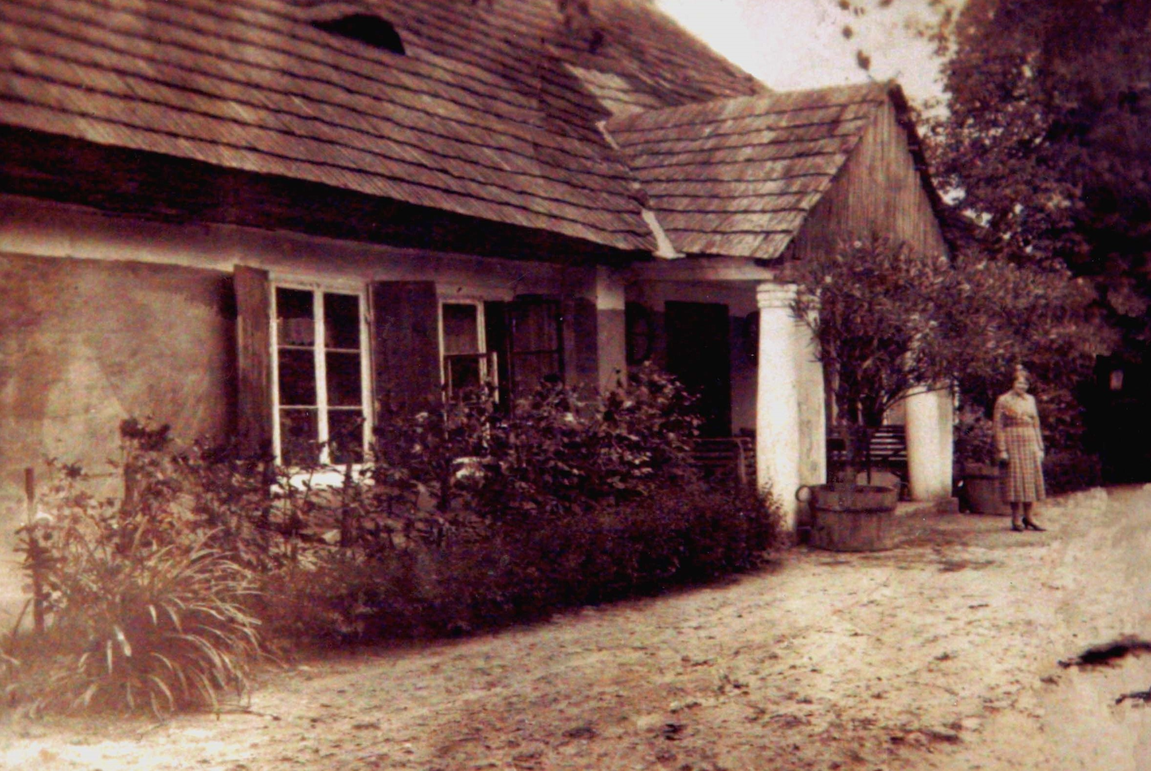 Nieistniejący dwór z końca XVIII wieku w Zakrzowie (gmina Oksa) - od 1874 roku własność lekarza Floriana Krassowskiego.